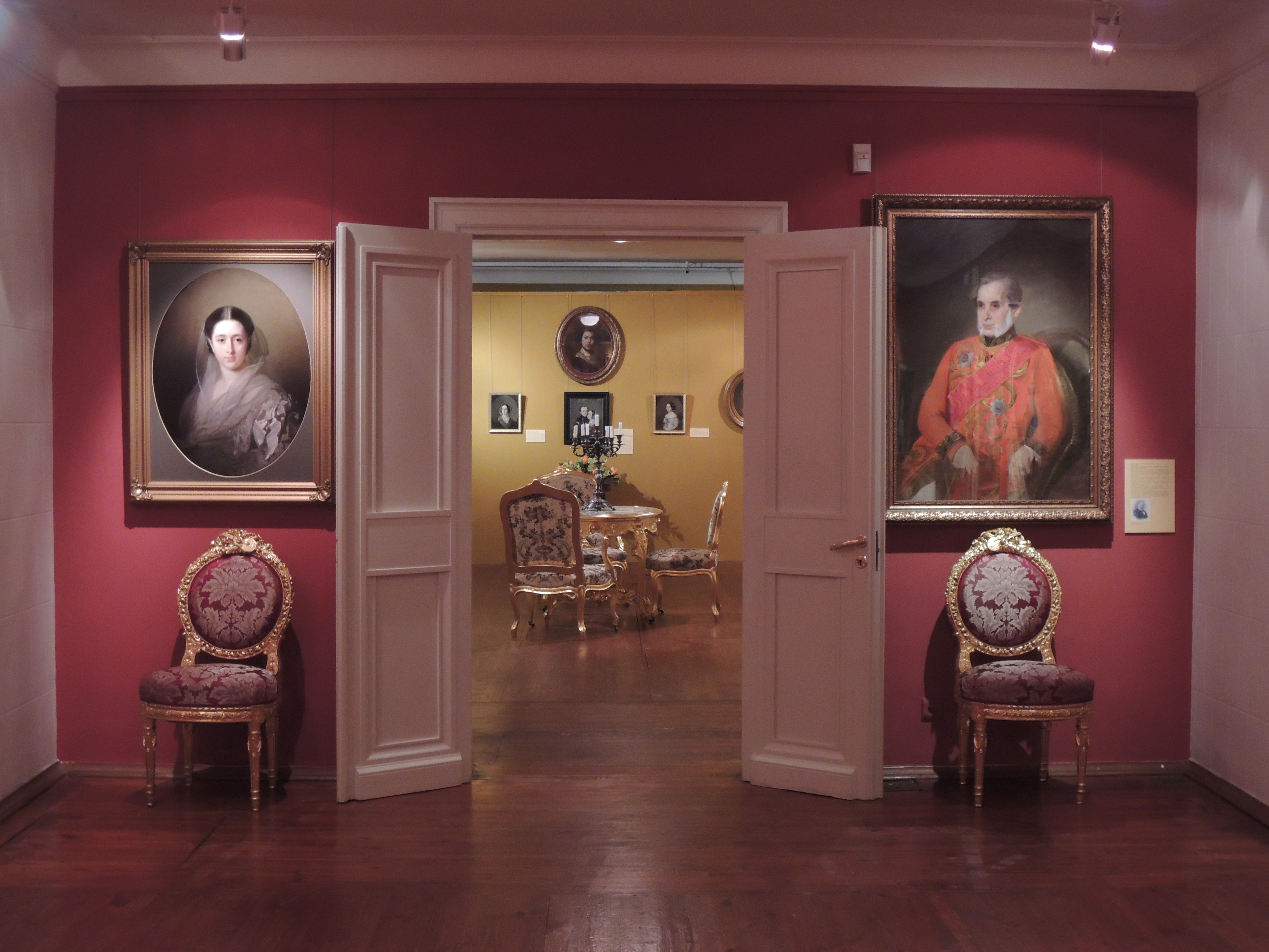 «Знакомцы давние». Иван Макаров. Монографическая выставка известного русского живописца к 200-летию Н.Н. Пушкиной-Ланской (Гончаровой) и 190-летию художника. 45 портретов из 14 музеев России впервые собраны вместе. Выставка, подготовленная Государственным музеем А.С. Пушкина на Пречистенке совместно с Мордовским республиканским музеем им. С.Д. Эрьзи (г. Саранск) и при участии московских, петербургских и региональных музеев.